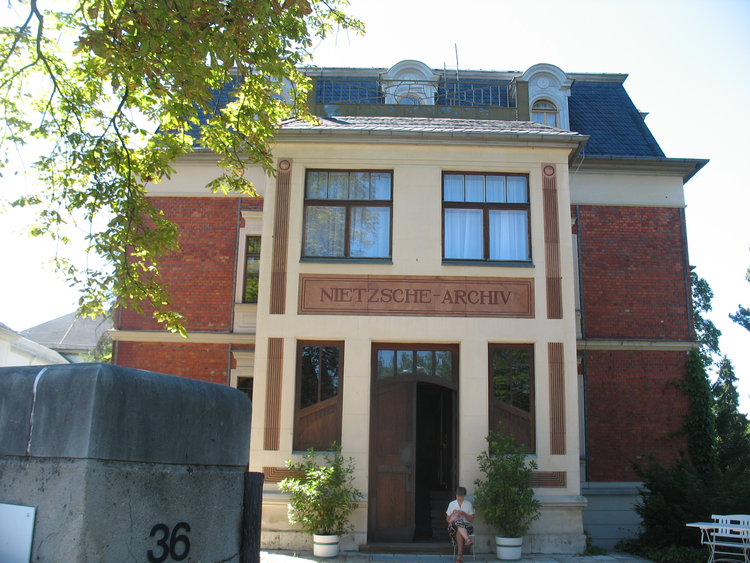 The Nietzsche Archives in Weimar, Germany.